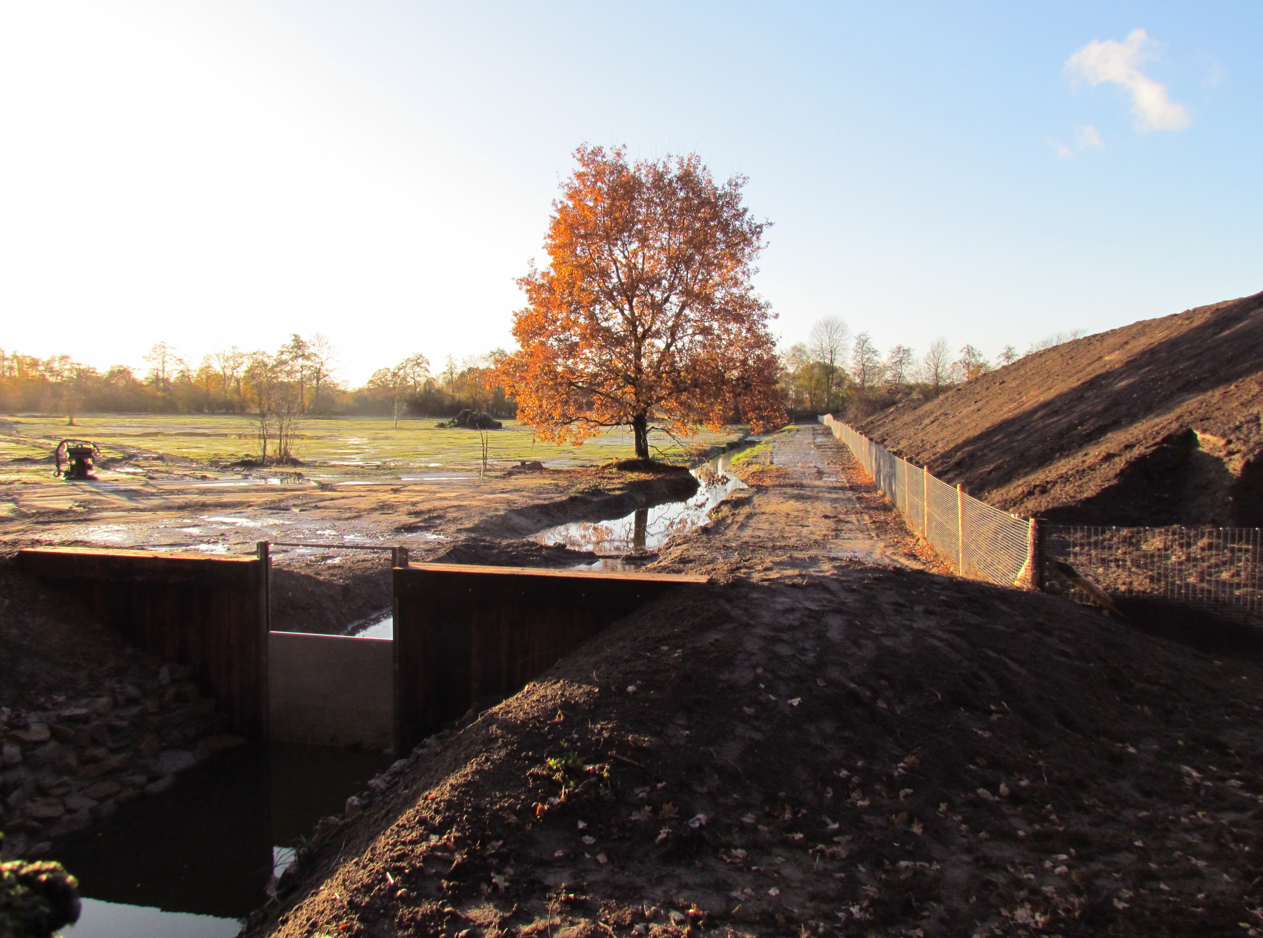 Het Beekbergerwoud (nieuwe natuur bij de snelweg A50 ter hoogte van Apeldoorn) wordt herontwikkeld